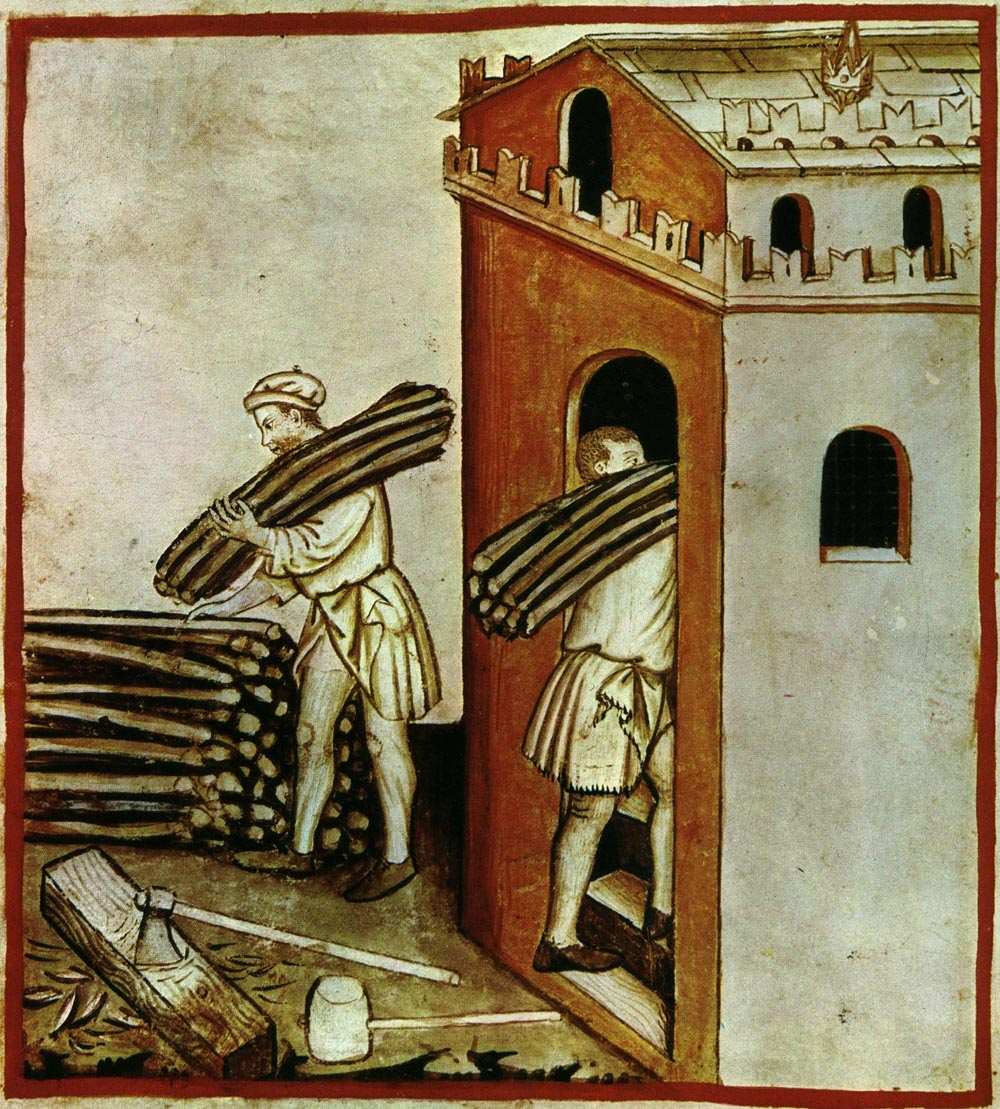 Tacuina sanitatis (XIV century) 5-aspetti di vita quotidiana, stagione fredda,Taccuino Sani